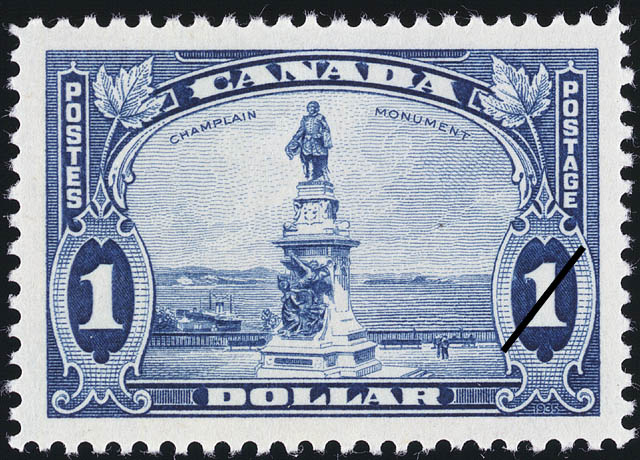 Timbre-poste du Canada 1 dollar Champlain 1935